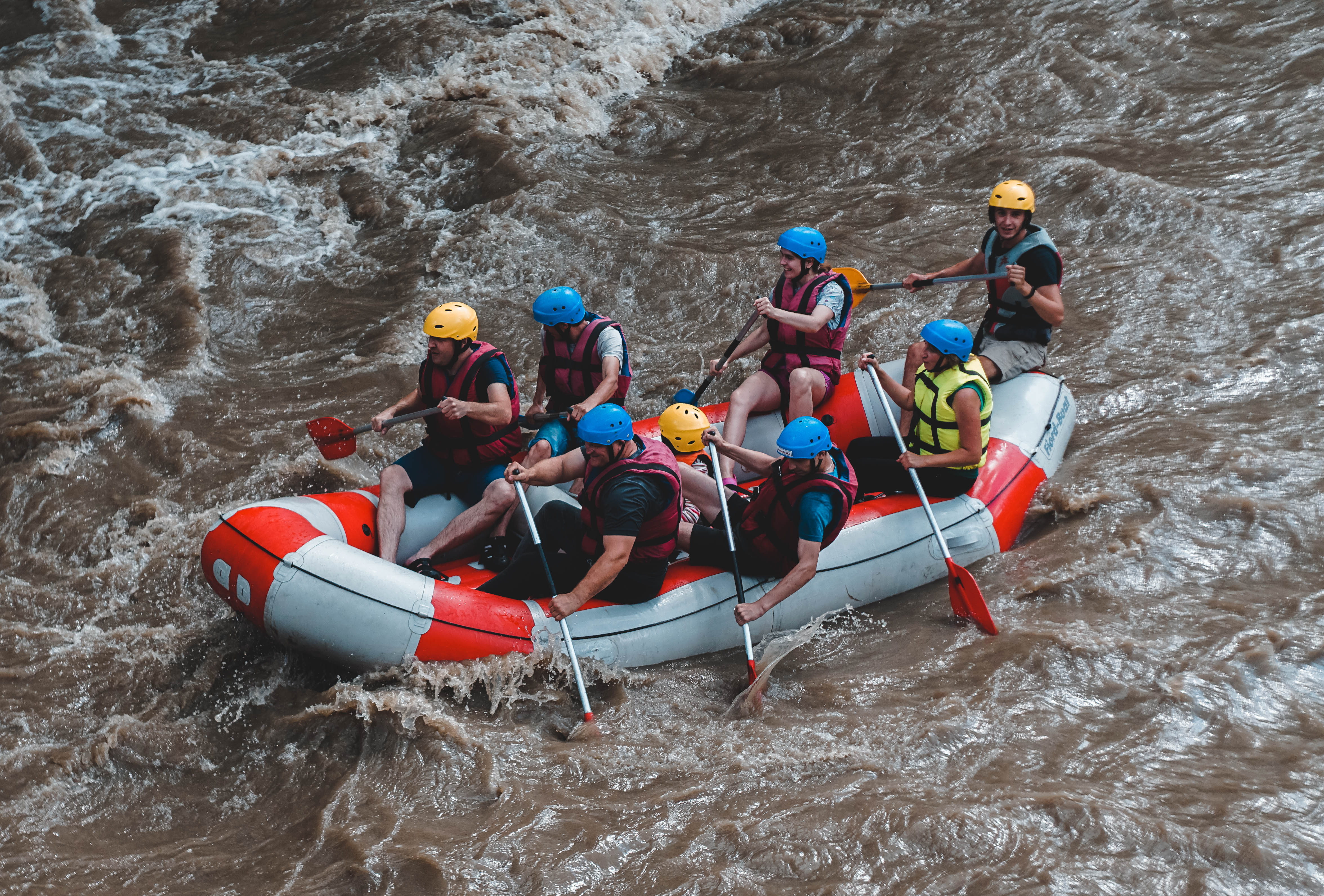 Сплав по Чорному Черемошу